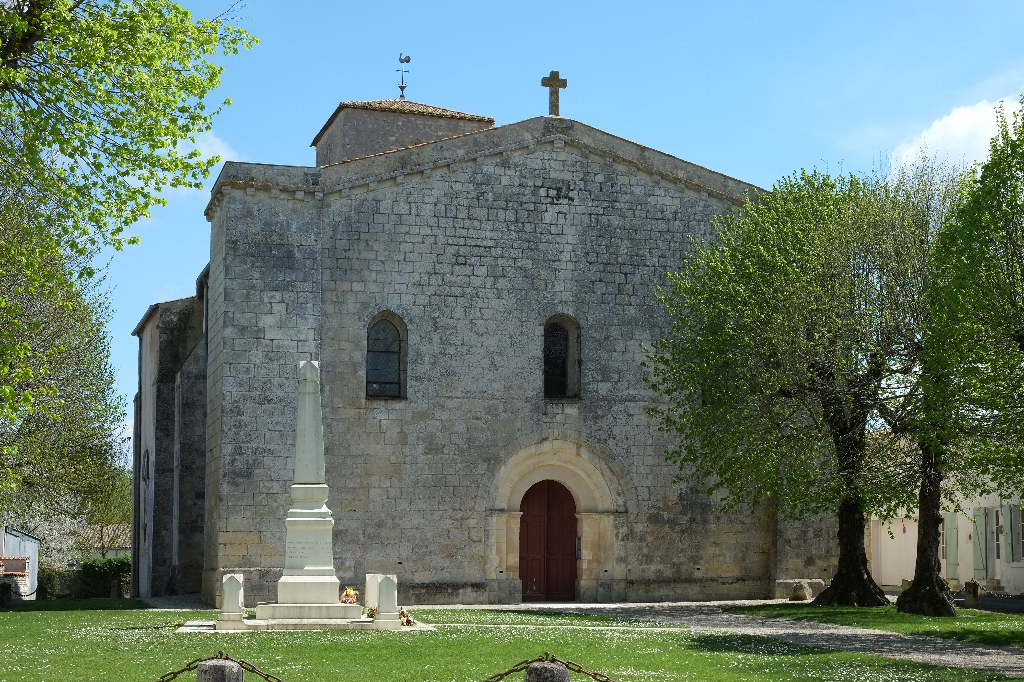 Église de la Transfiguration Saint-Sauveur-d'Aunis Charente-Maritime France